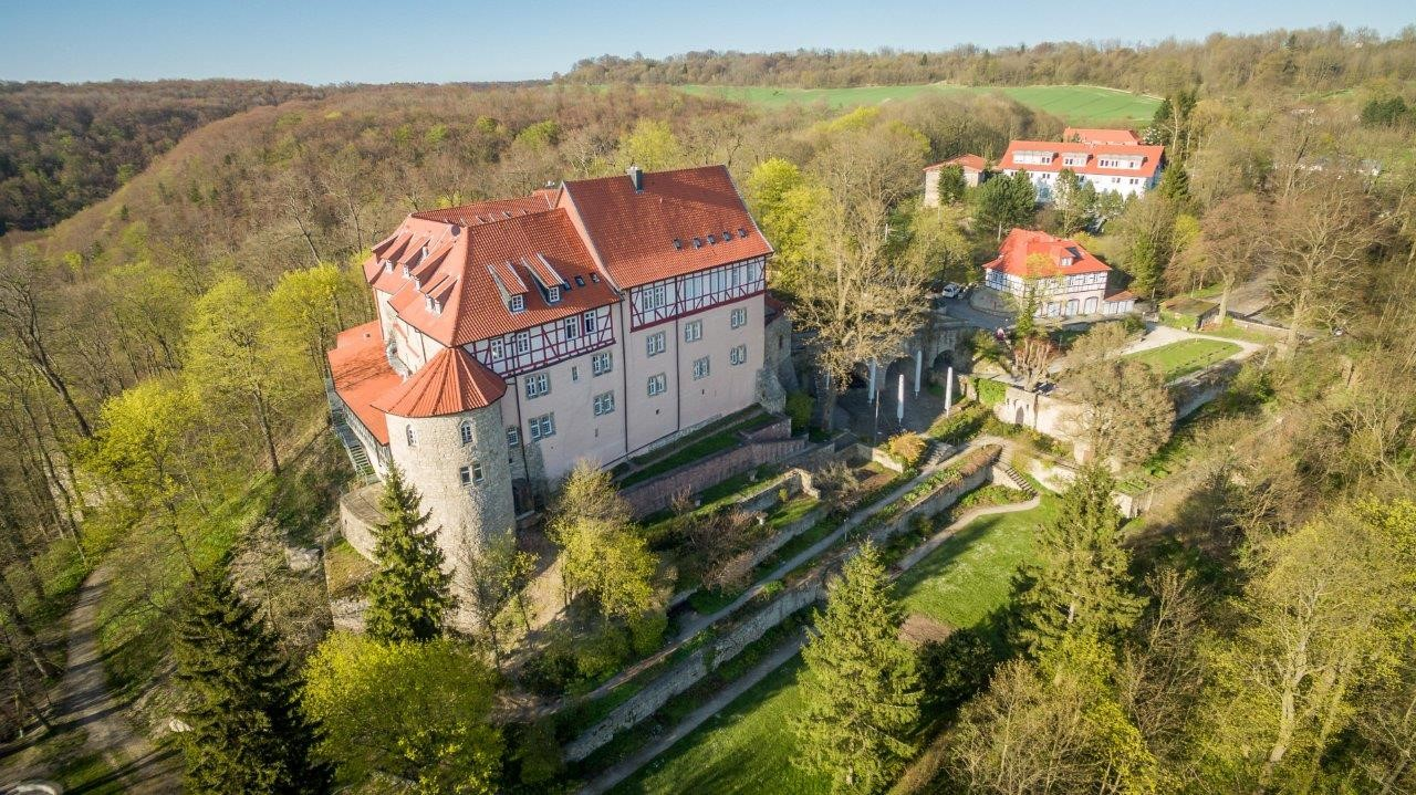 Luftaufnahme aus Richtung Südwesten